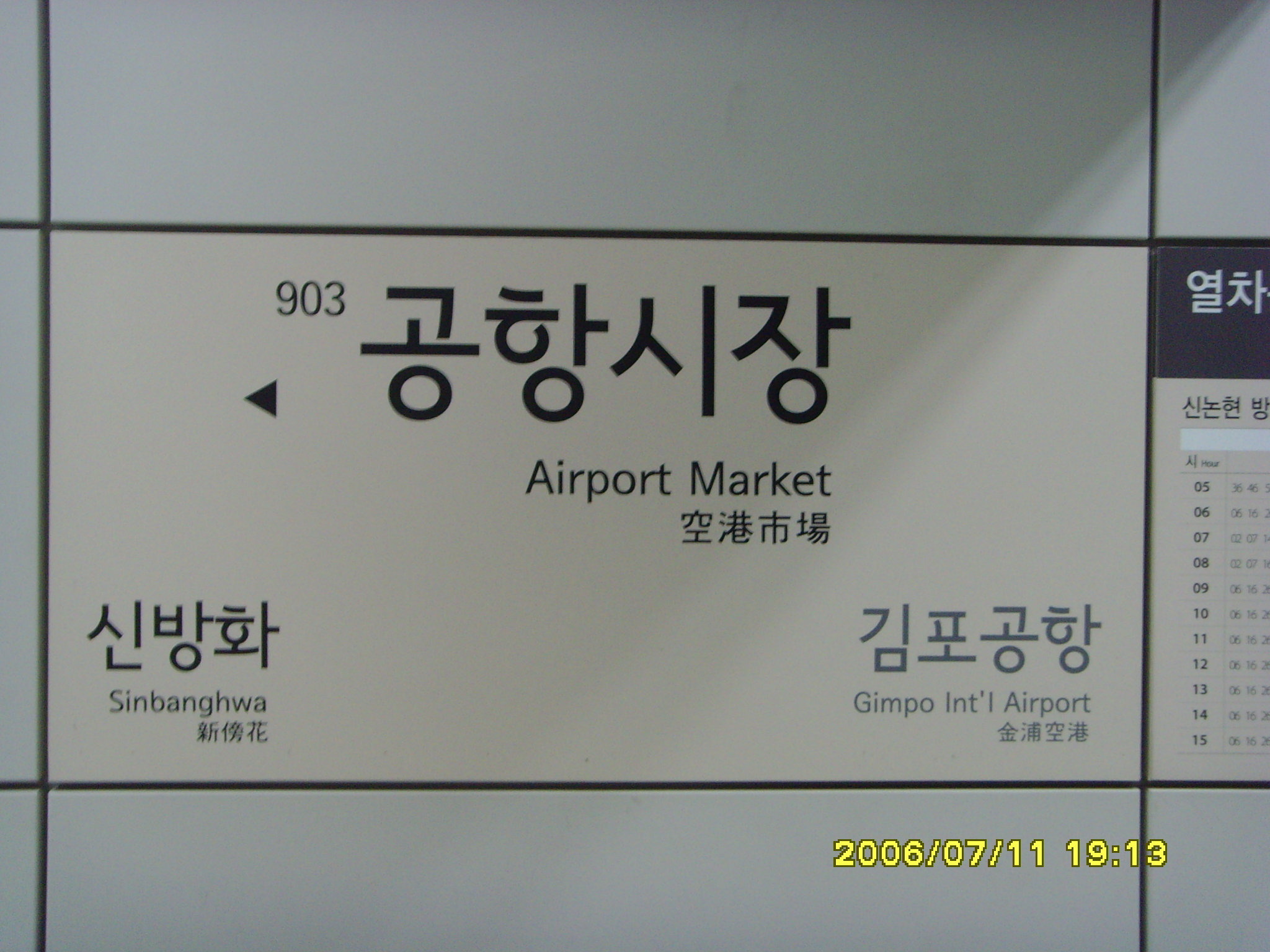 ソウル地下鉄9号線空港市場駅 駅名標